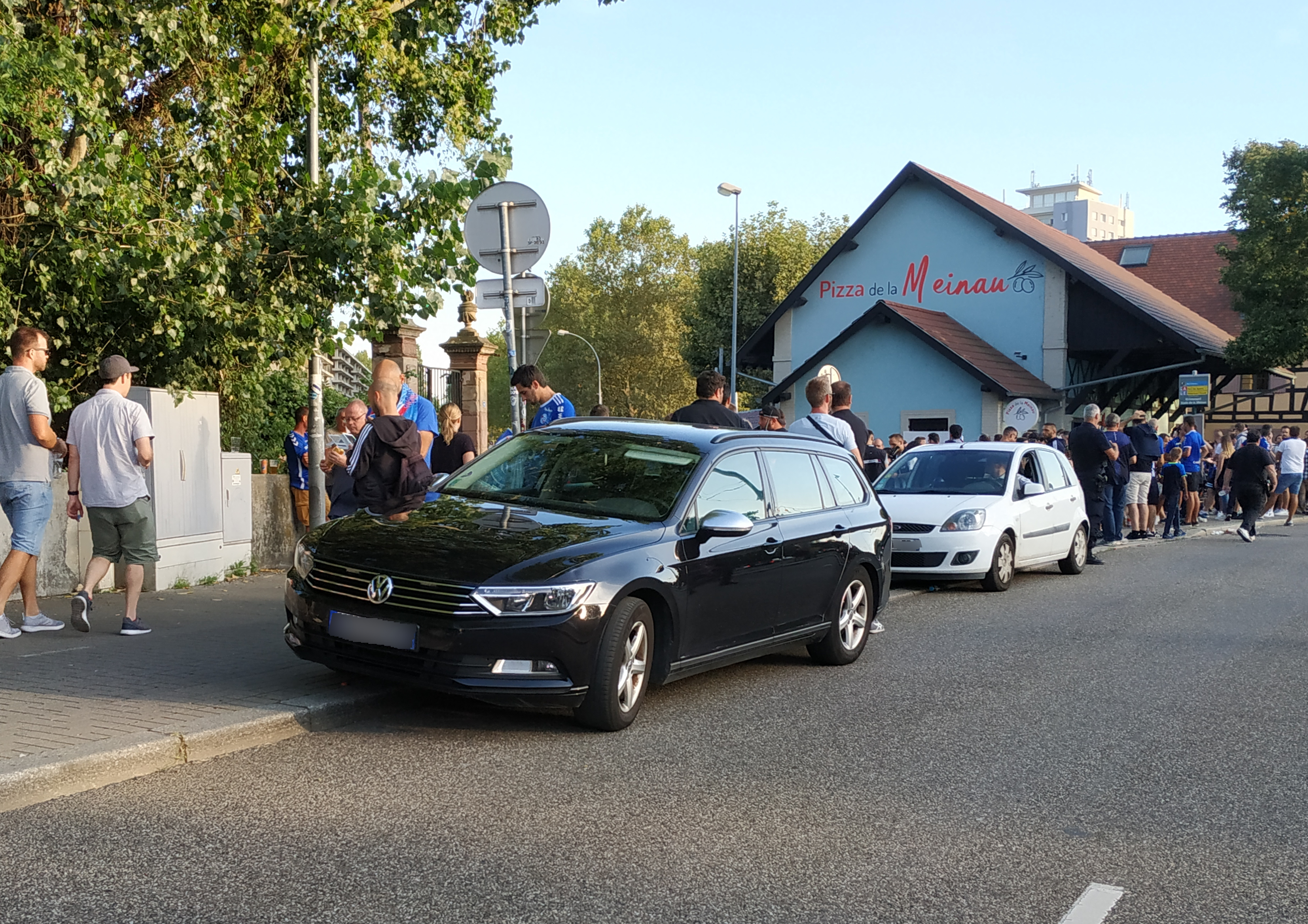 Volskwagen Passat de la BAC 67, lors du match Racing-Eintracht Francfort à Strasbourg (22 août 2019)